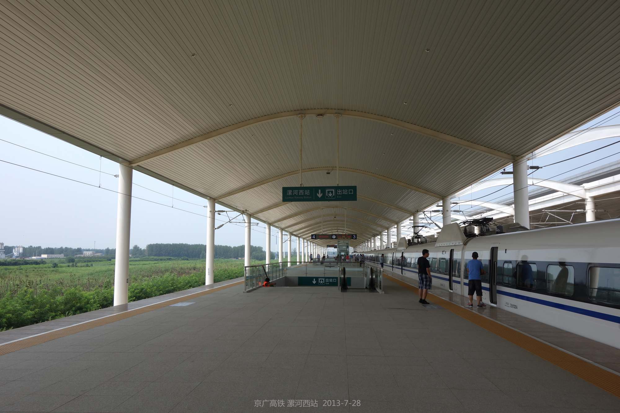 漯河西站 luo he xi zhan